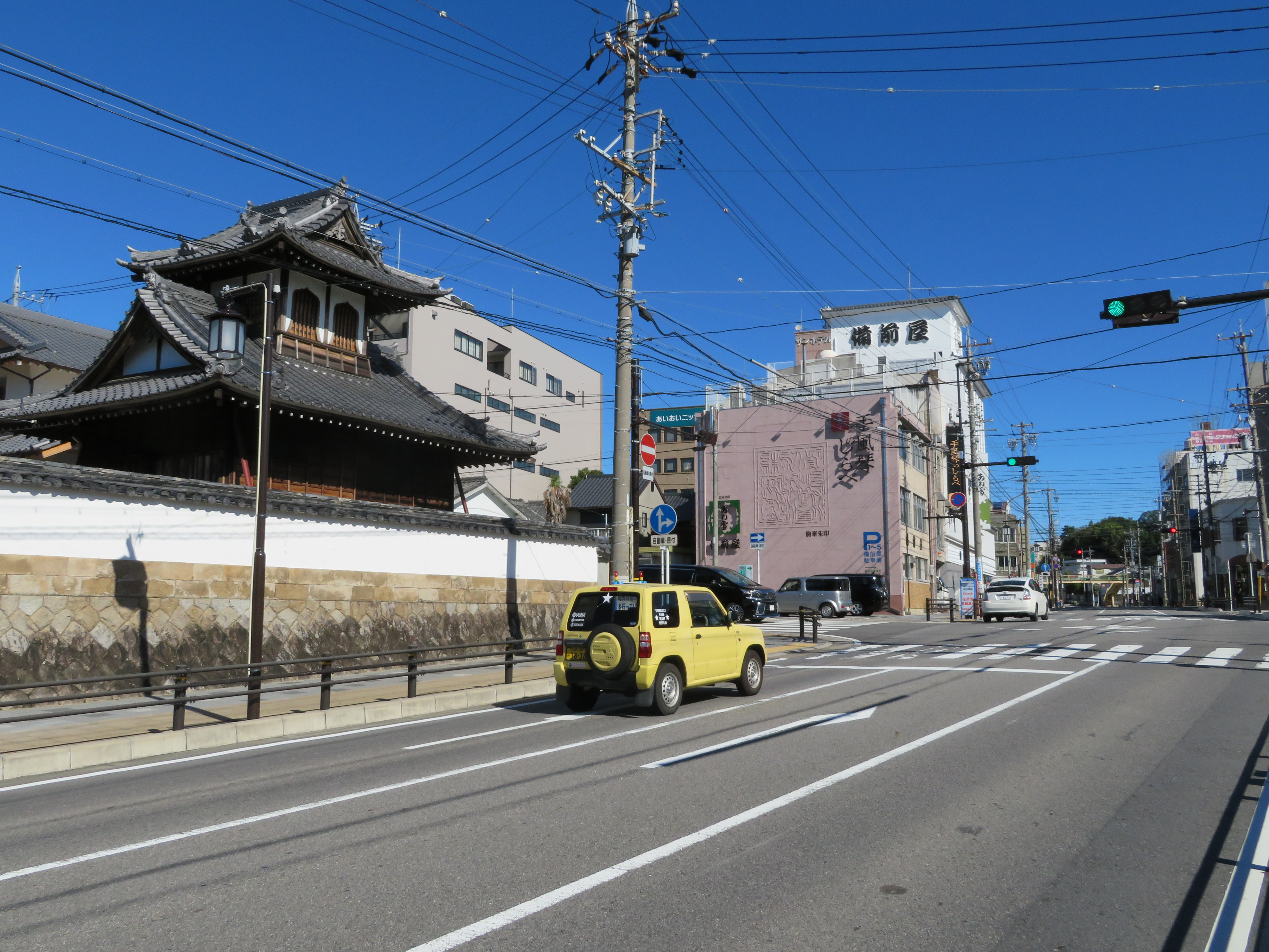 愛知県道477号東大見岡崎線。岡崎市祐金町、伝馬通。